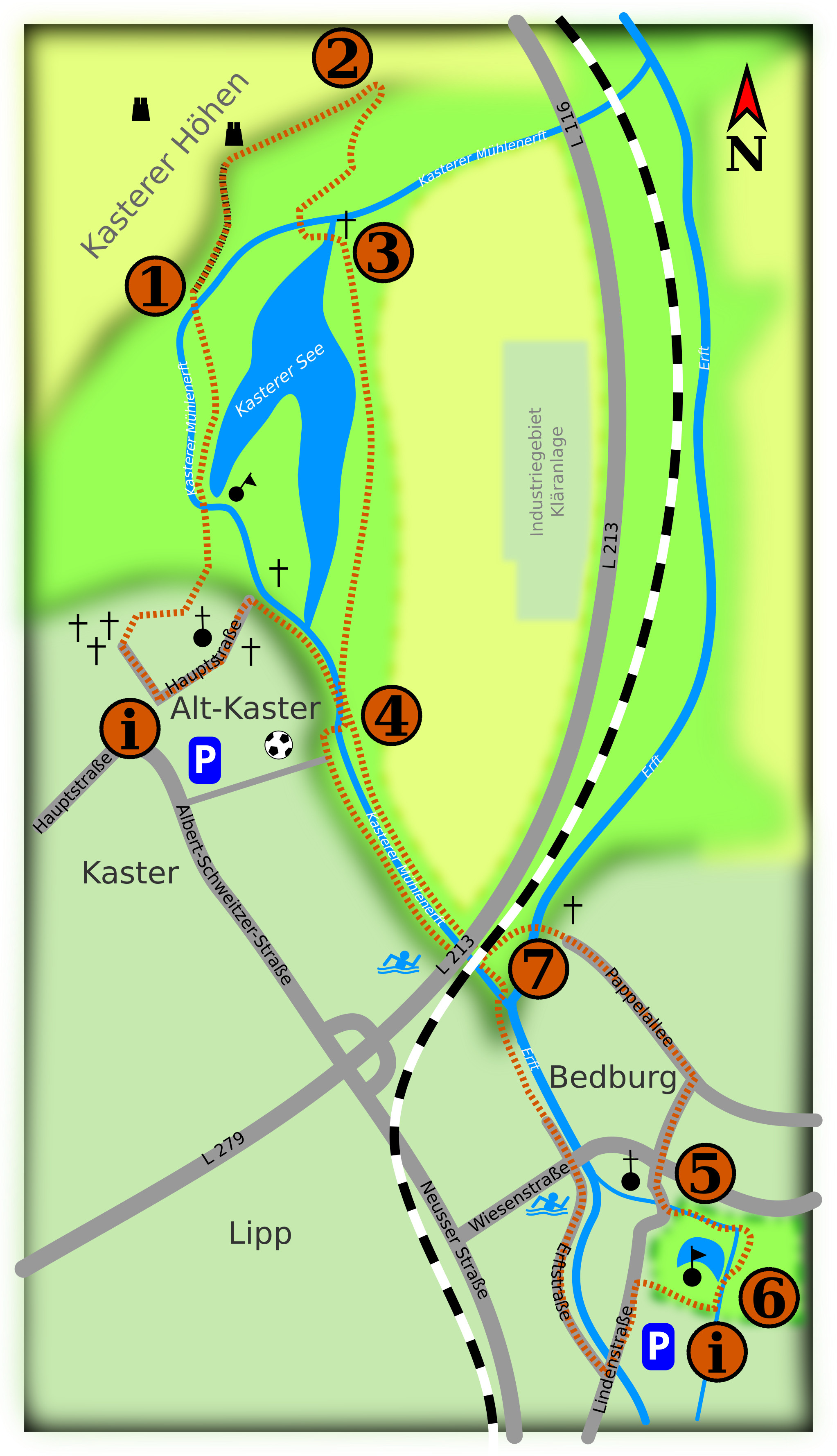 Werwolfwanderweg Karte